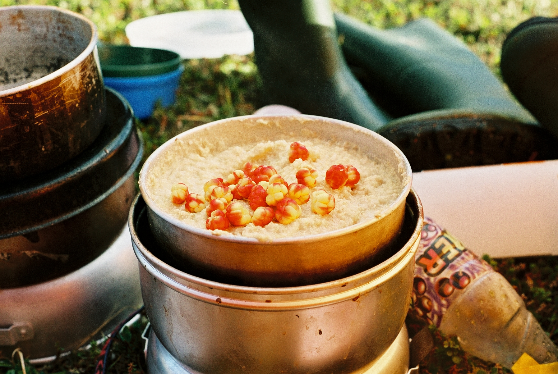 Cloudberries in oatmeal porridge. Photo taken by oskarlin in Jokkmokk, Norrbotten, Sweden.